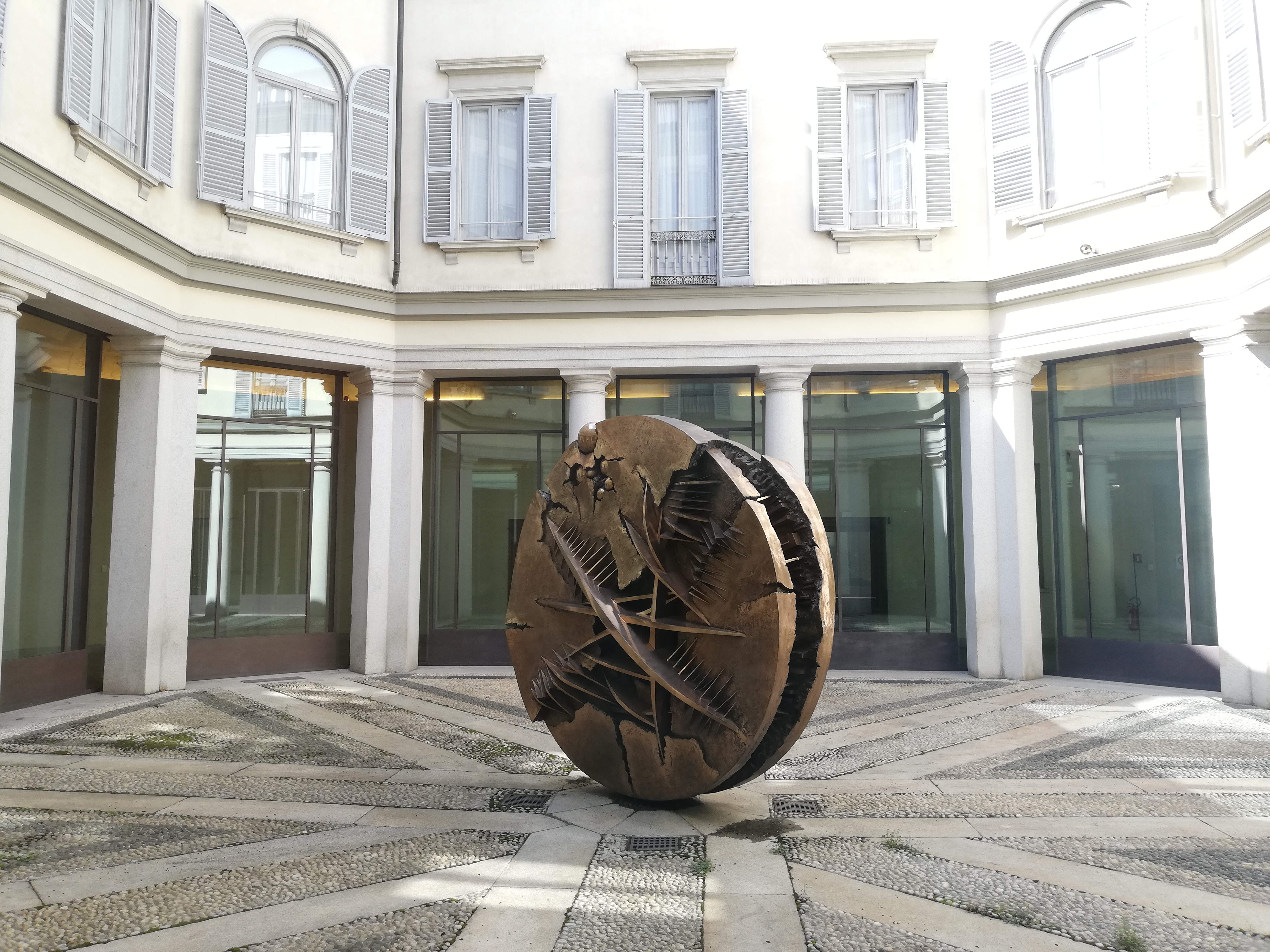 Arnaldo Pomodoro, Disco in forma di rosa del deserto n. 1, 1993-1994, bronzo, cortile di Palazzo Anguissola Antona Traversi, Milano, Gallerie d'Italia, Piazza Scala, sede museale di Intesa Sanpaolo, via Manzoni 10 This is a photo of a monument which is part of cultural heritage of Italy.